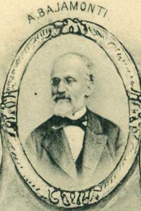 Antonio Bajamonti in una cartolina propagandistica dei primi del Novecento. Scansione personale da antica cartolina della mia collezione.